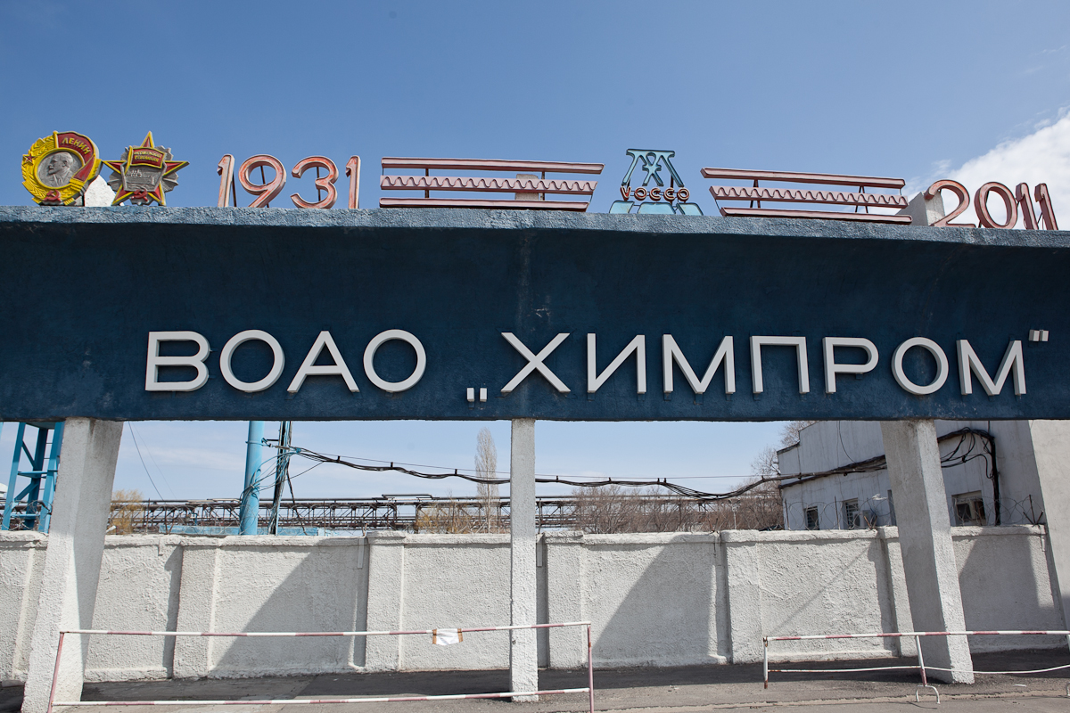 Завод «Химпром» (Волгоград)